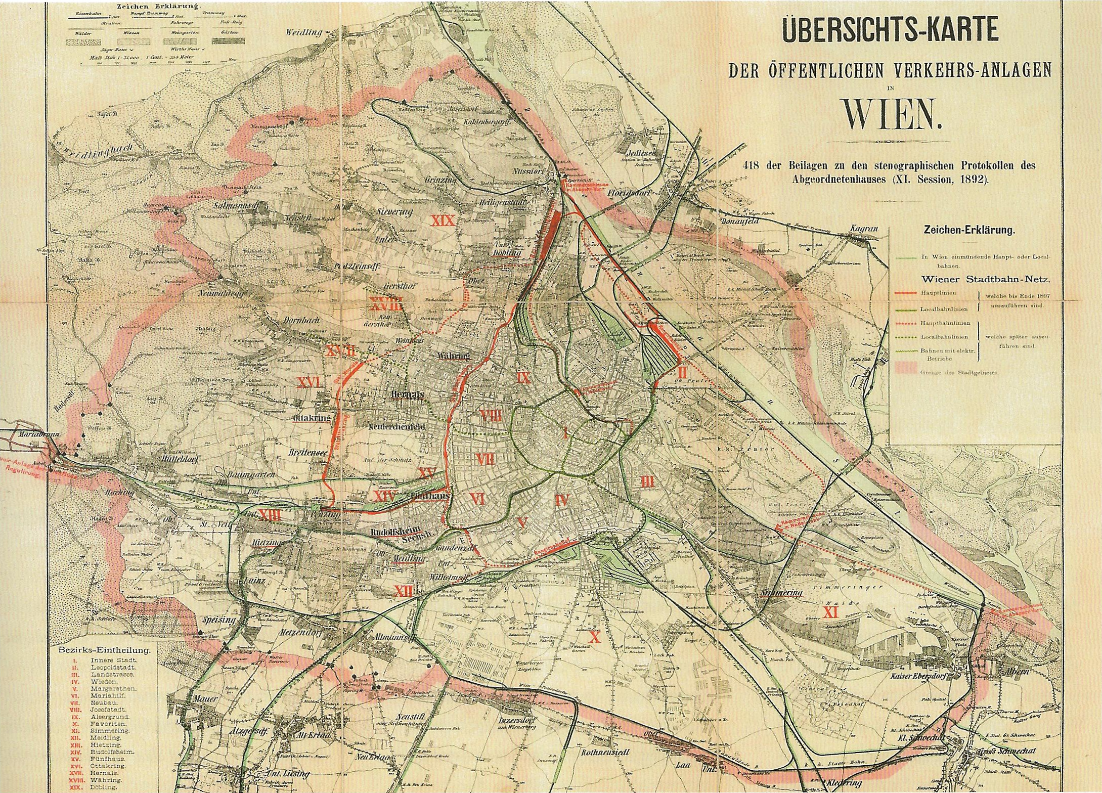 urbfervojo de Vieno kiel projektite en leĝo de 1892